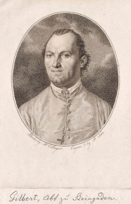 Gilbert Michl (1750-1828), Abt des Klosters Steingaden, Komponist